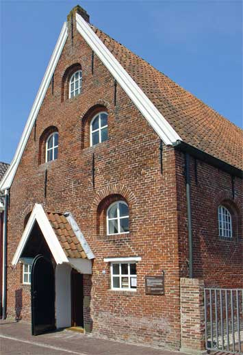 voormalige garnizoenskerk te Nieuweschans